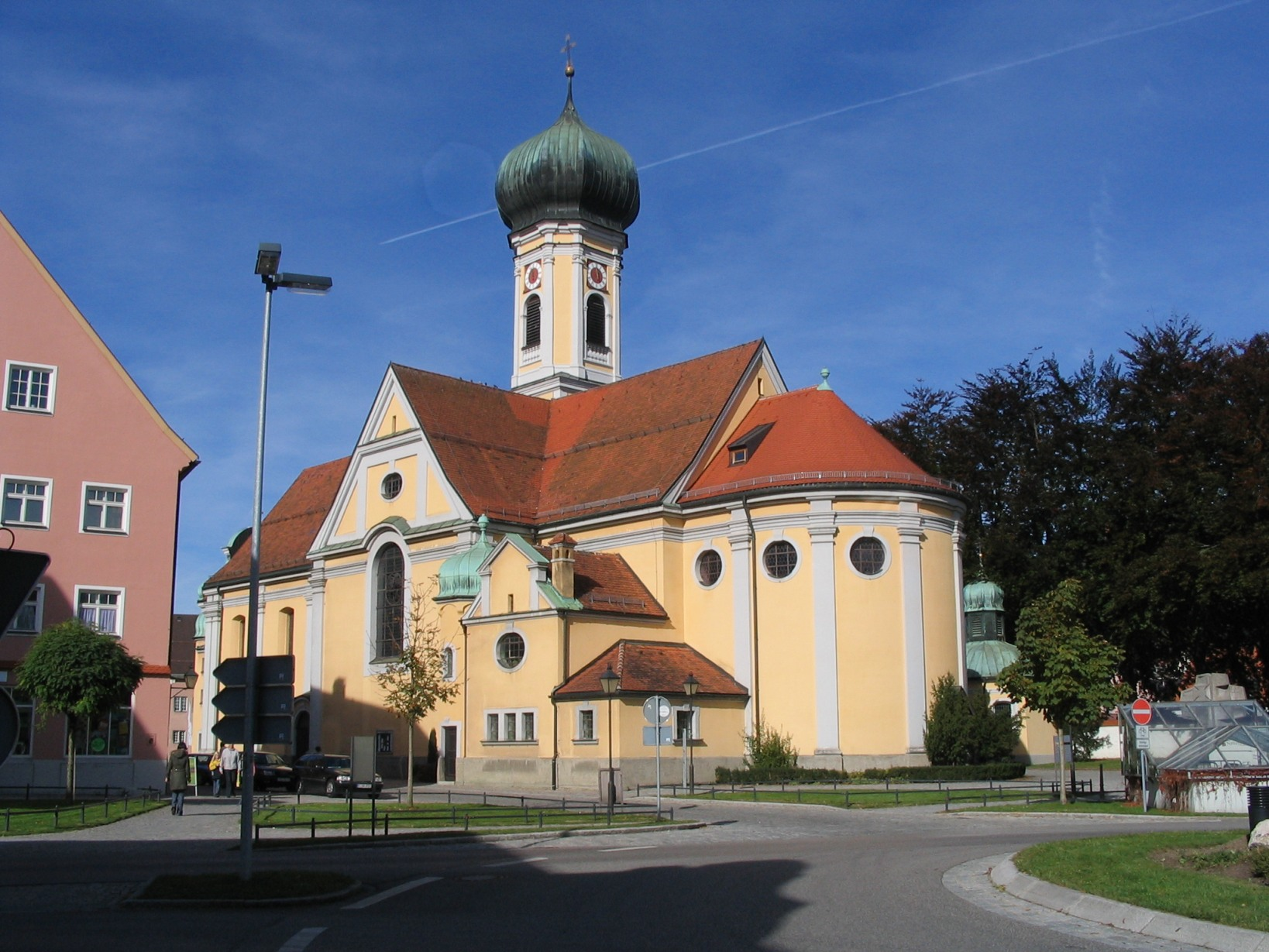 Stadtpfarrkirche St. Nikolaus in Immenstadt, Süd-Ost-Ansicht